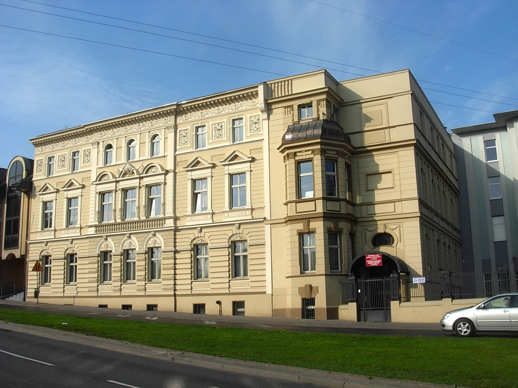 Kamienica ul. Kujawska 4 w Bydgoszczy (1890-1904, Józef Święcicki)